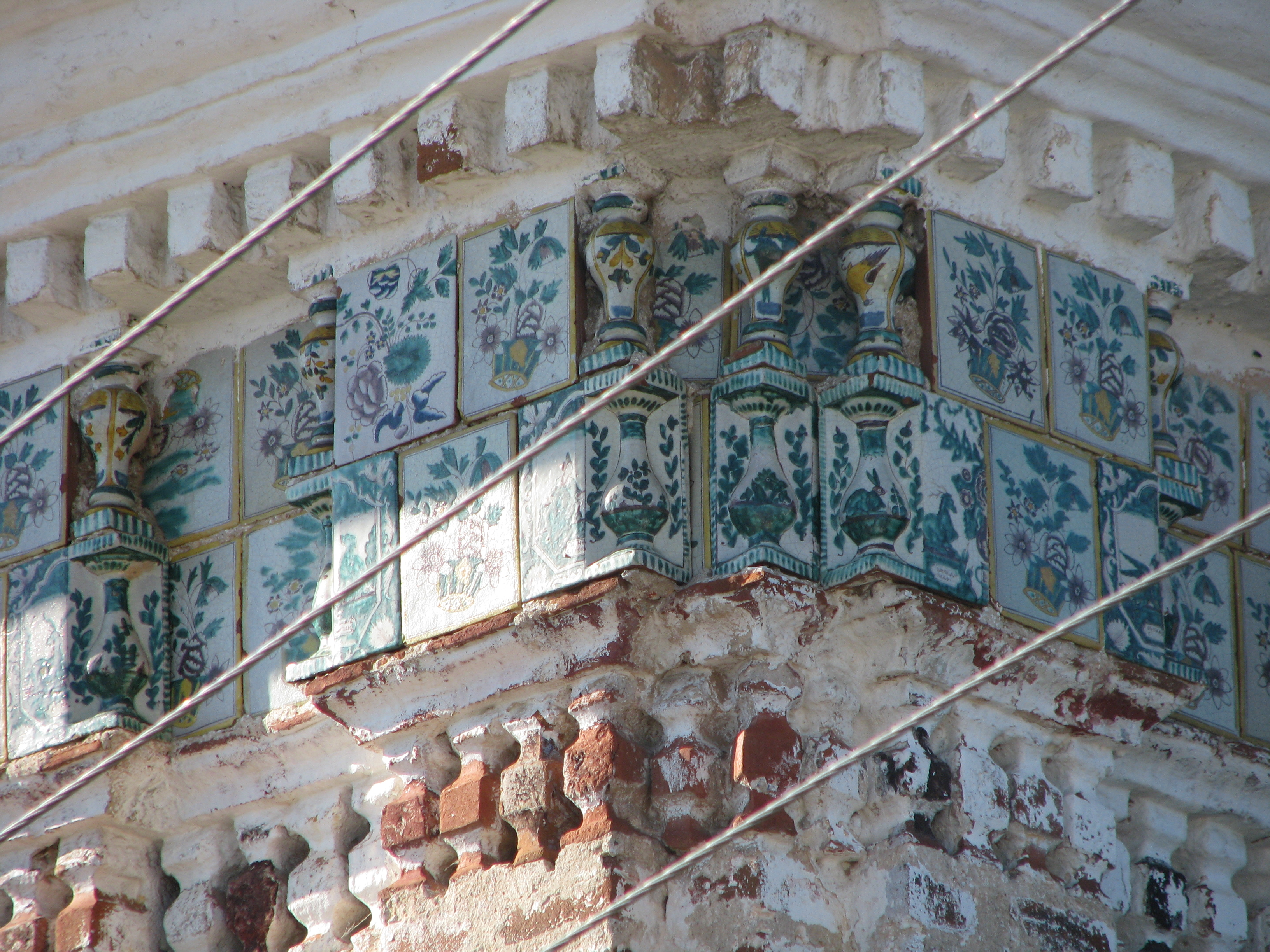 Церковь Ильи Пророка: улица Пионерская, 14, Гаврилов Посад, Гаврилово-Посадский район, Ивановская область